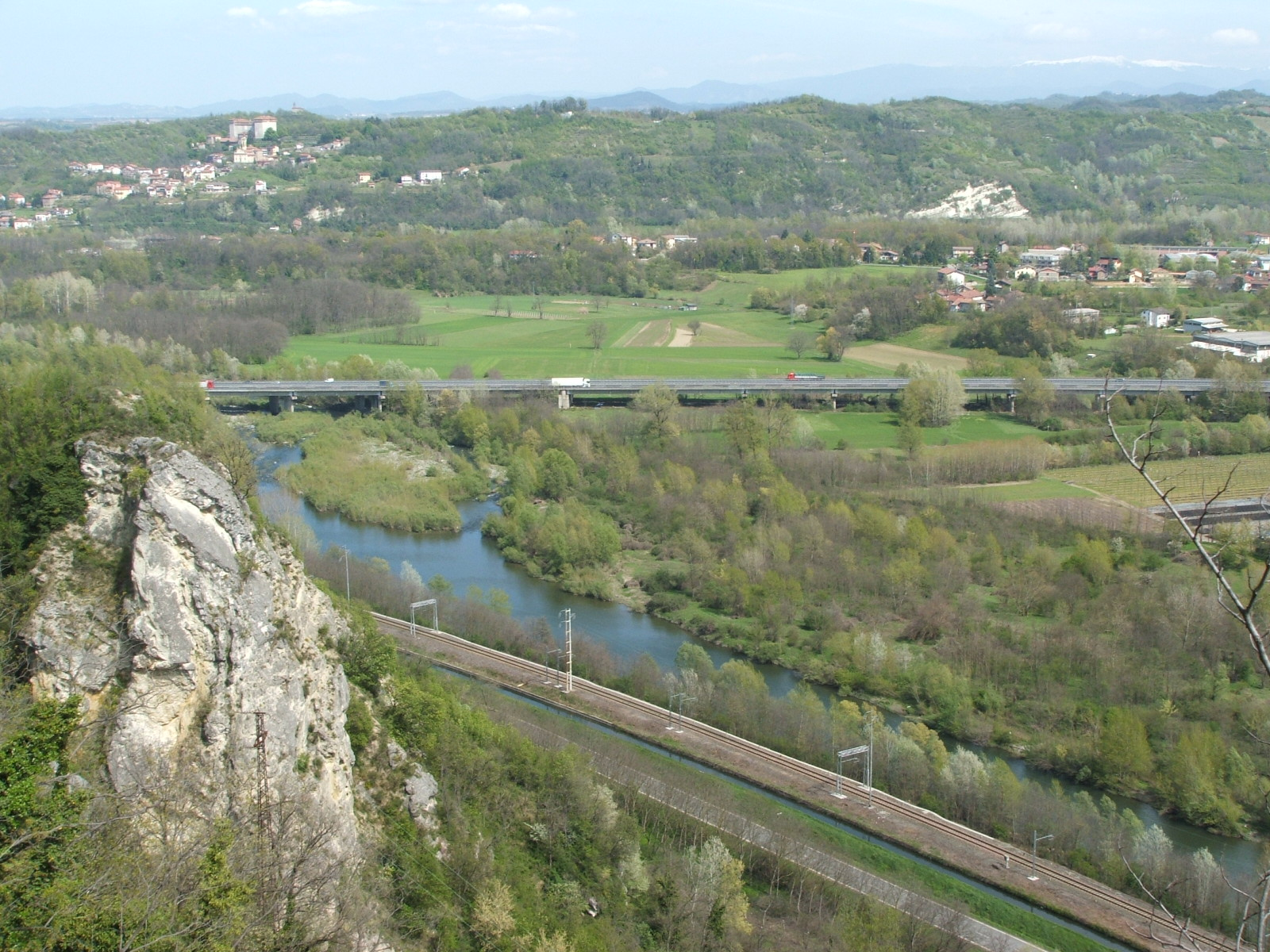 Rocca Grimalda, Alessandria, Piemonte, Italia